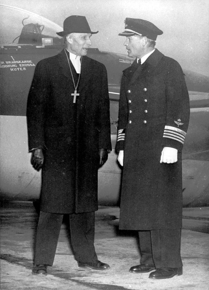 Biskop Manfred Björkquist tillsammans med flottiljchefen överste Hägglöf.Vårt ansvar talade biskop Manfred Björkquist om, när han på fredagen – andra visitationsdagen på Järfälla – höll korum på Kungl. Svea flygflottilj i Barkarby.